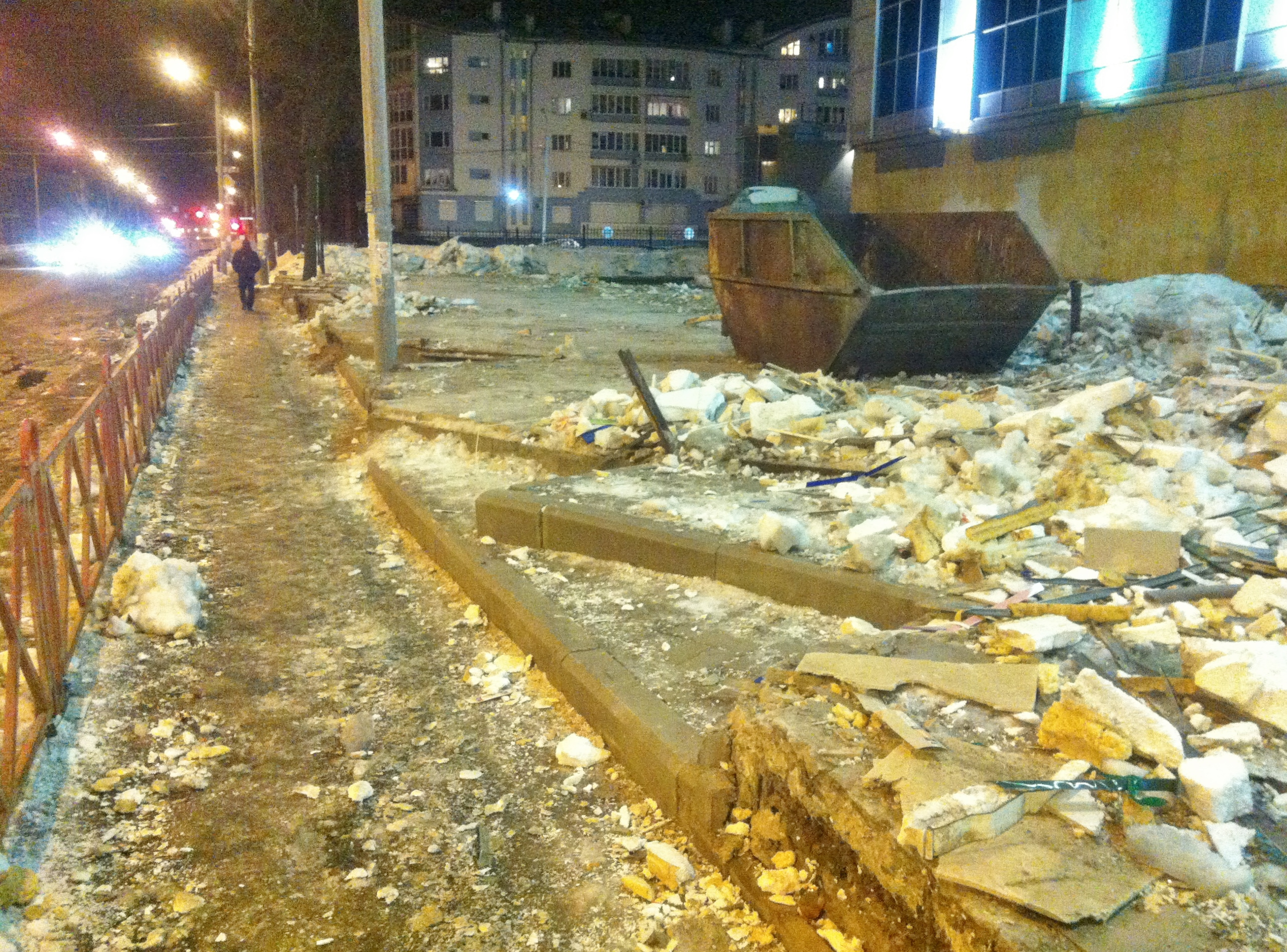 Обломки на месте снесенных торговых точек у универмага "Ярославль"